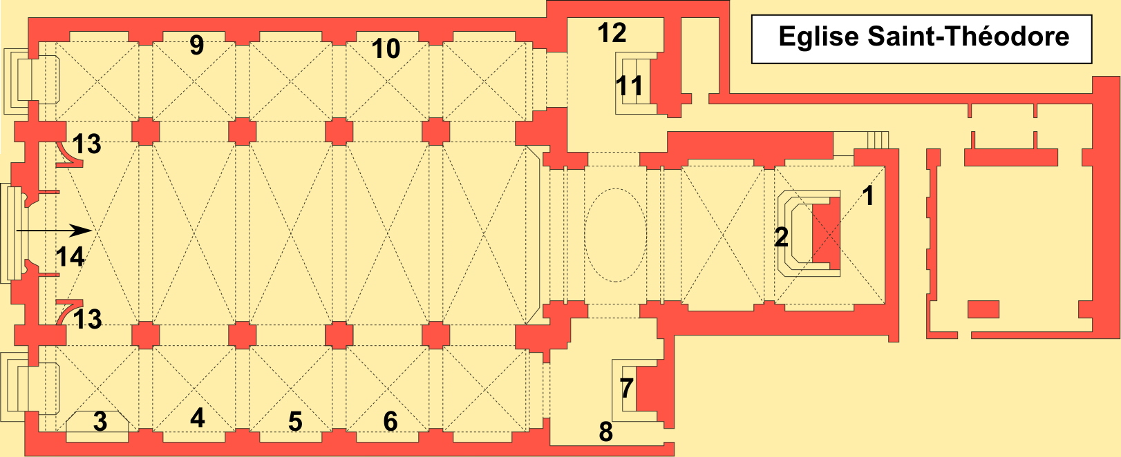 Eglise Saint-Théodore à Marseille située 3 rue des Dominicaines. Légende : 1-Tableau de l'embarquement de Saint-Louis, 2-Maître-autel, 3-Fonts baptismaux (Fossati), 4- Autel de saint Antoine de Padoue, 5- Saint-Jérôme au désert, 6-Autel de saint Théodore, 7- Autel du Sacré-coeur, 8-Jugement de Sainte Barbe (François Puget), 9- Autel de Saint François d'Assise, 10- Autel de Saint Joseph, 11- Autel de la Vierge, 12- Martyre de Sainte Barbe (François Puget), 13- Bénitiers (Fossaty), 14- Grand orgue.